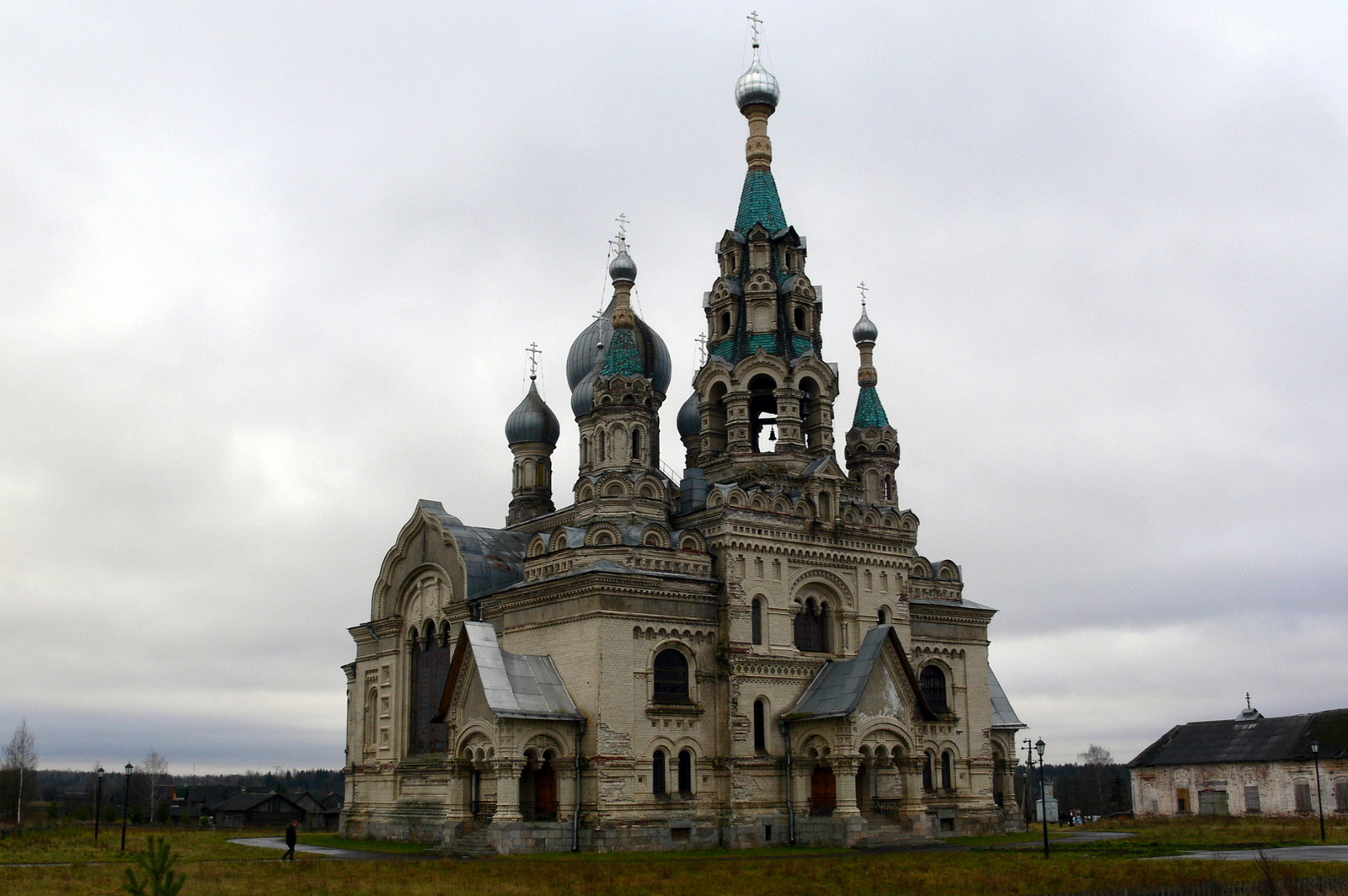 Село Кукобой Ярославской области. Храм Спаса Нерукотворного Образа, 1916 года постройки. Архитектор - Косяков, Василий Антонович.